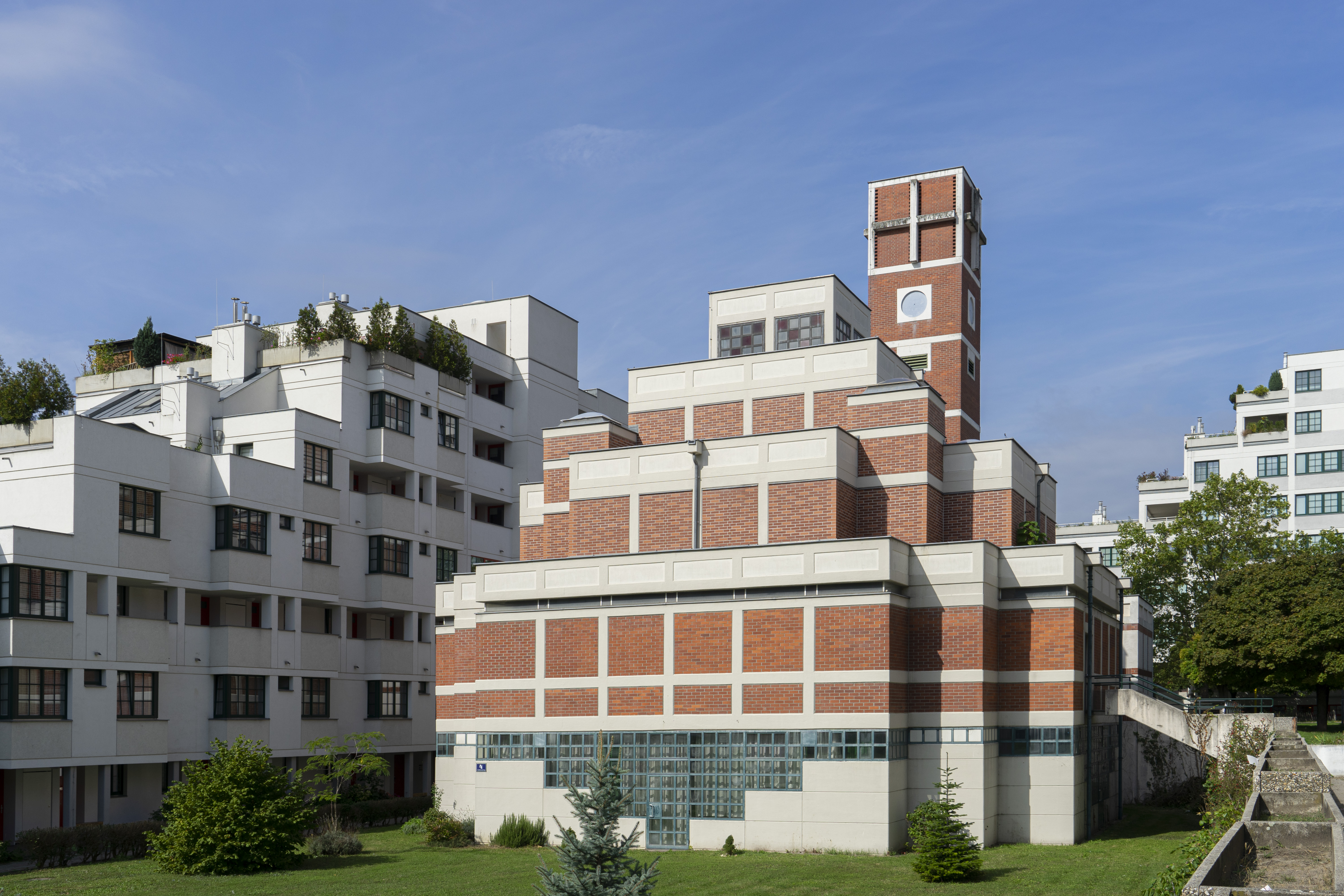 Kath. Pfarrkirche und Seelsorgezentrum Am Schöpfwerk hl. Franz von Assisi